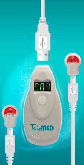 Бытовой прибор КВЧ-терапии для оптимизации работы всех систем организма